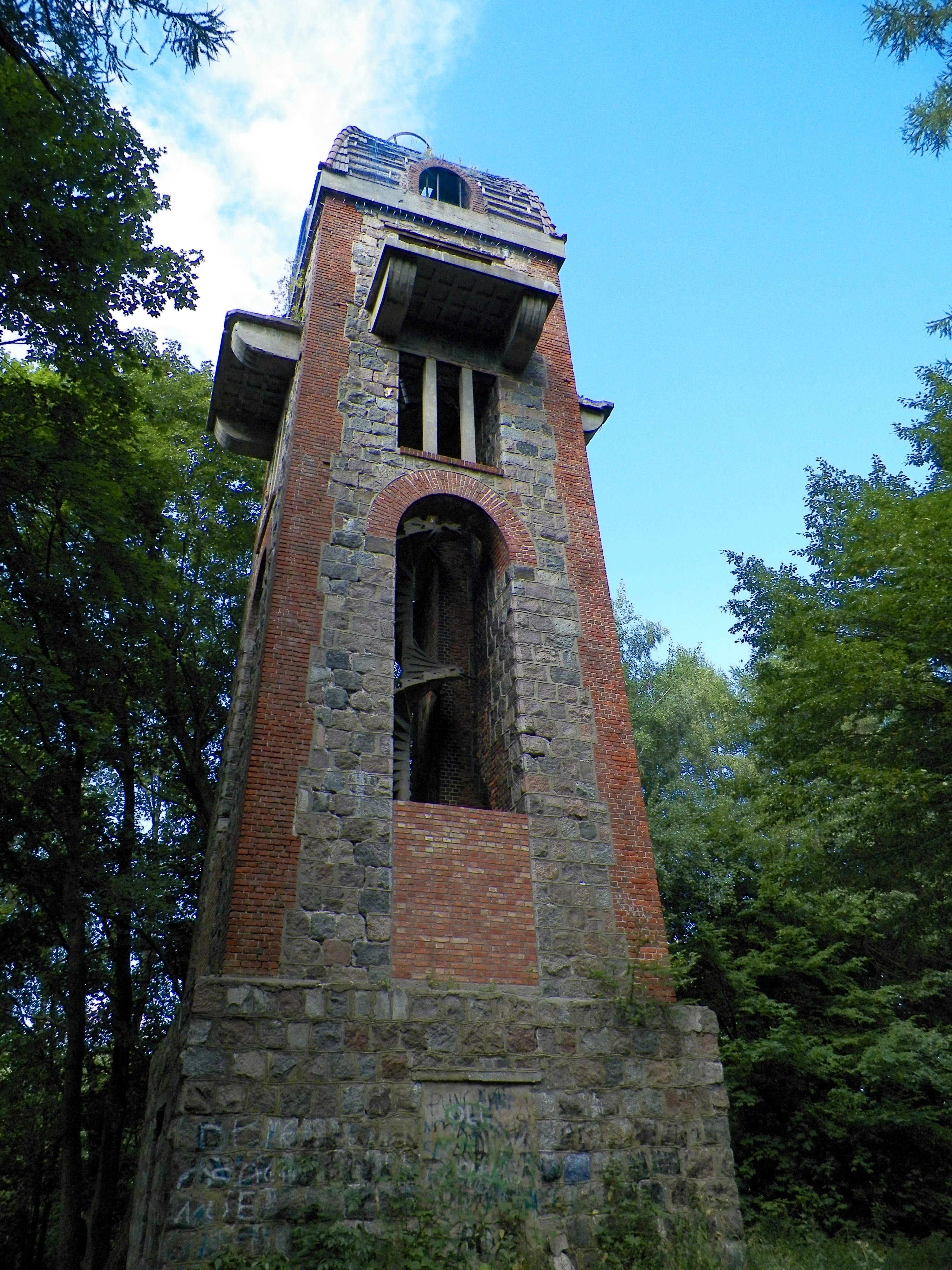 Świdwin, park miejski, 2 poł. XIX